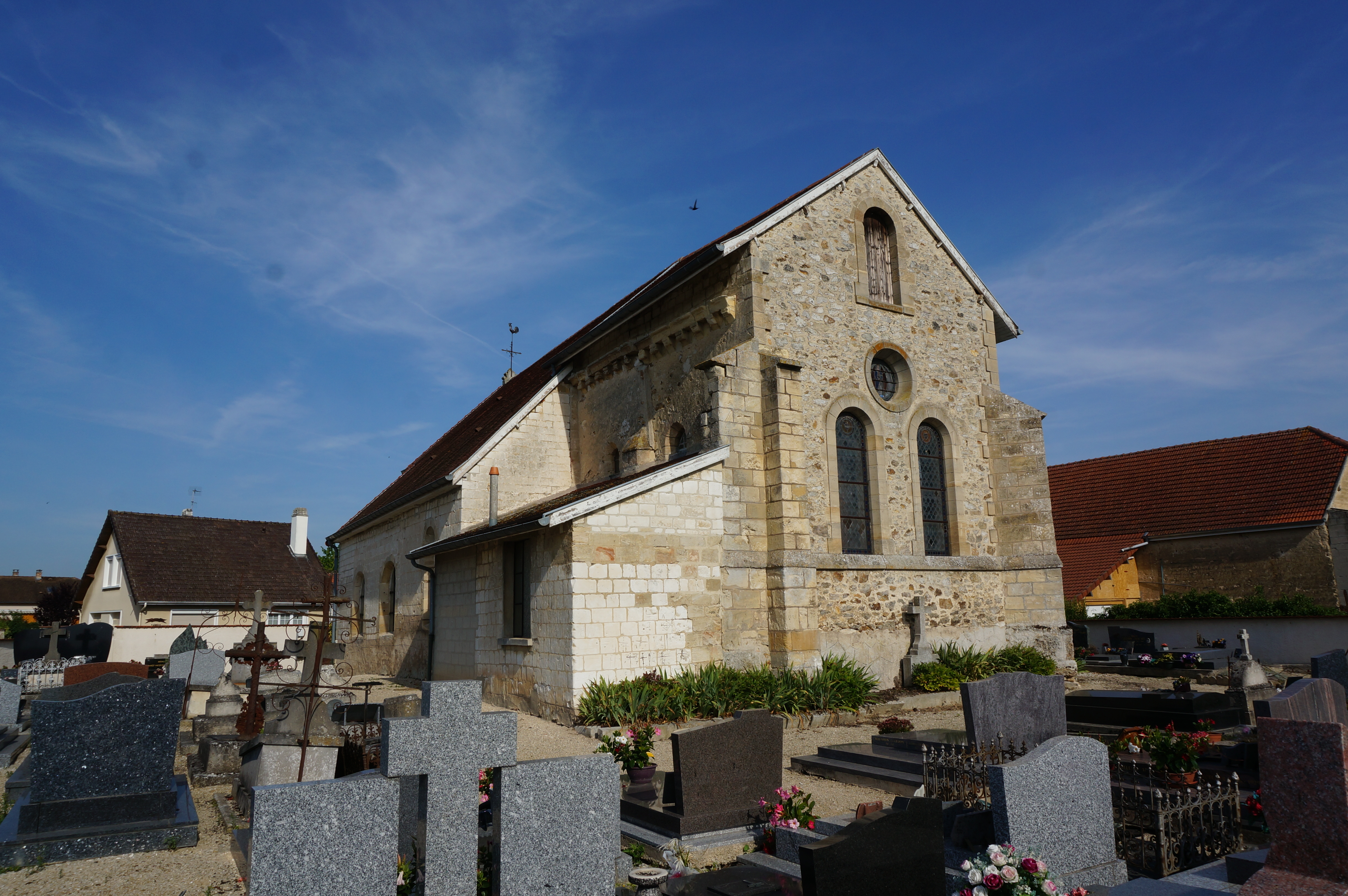 église à Vaudemange.